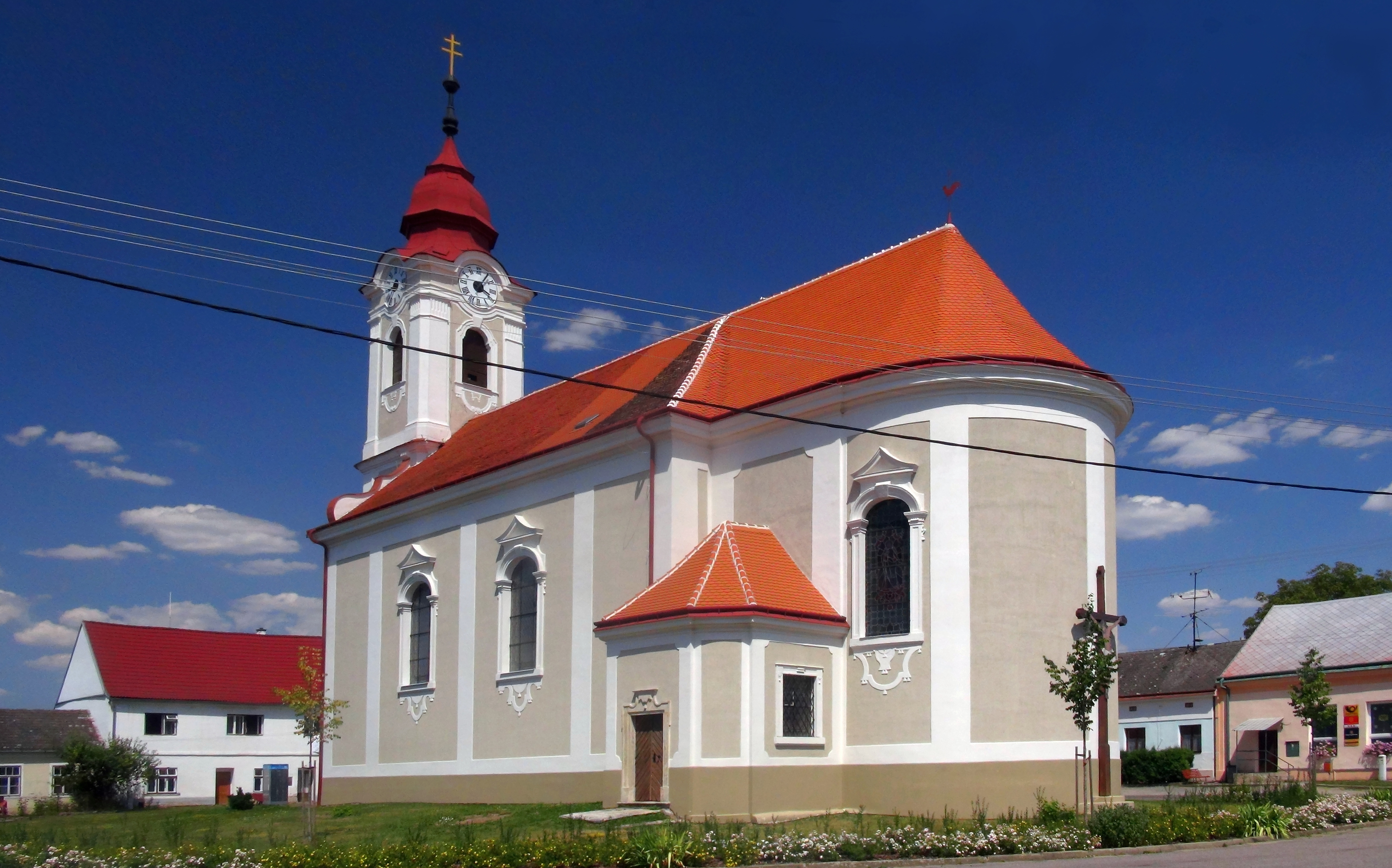 Kostel sv. Bartoloměje (Šafov), Šafov